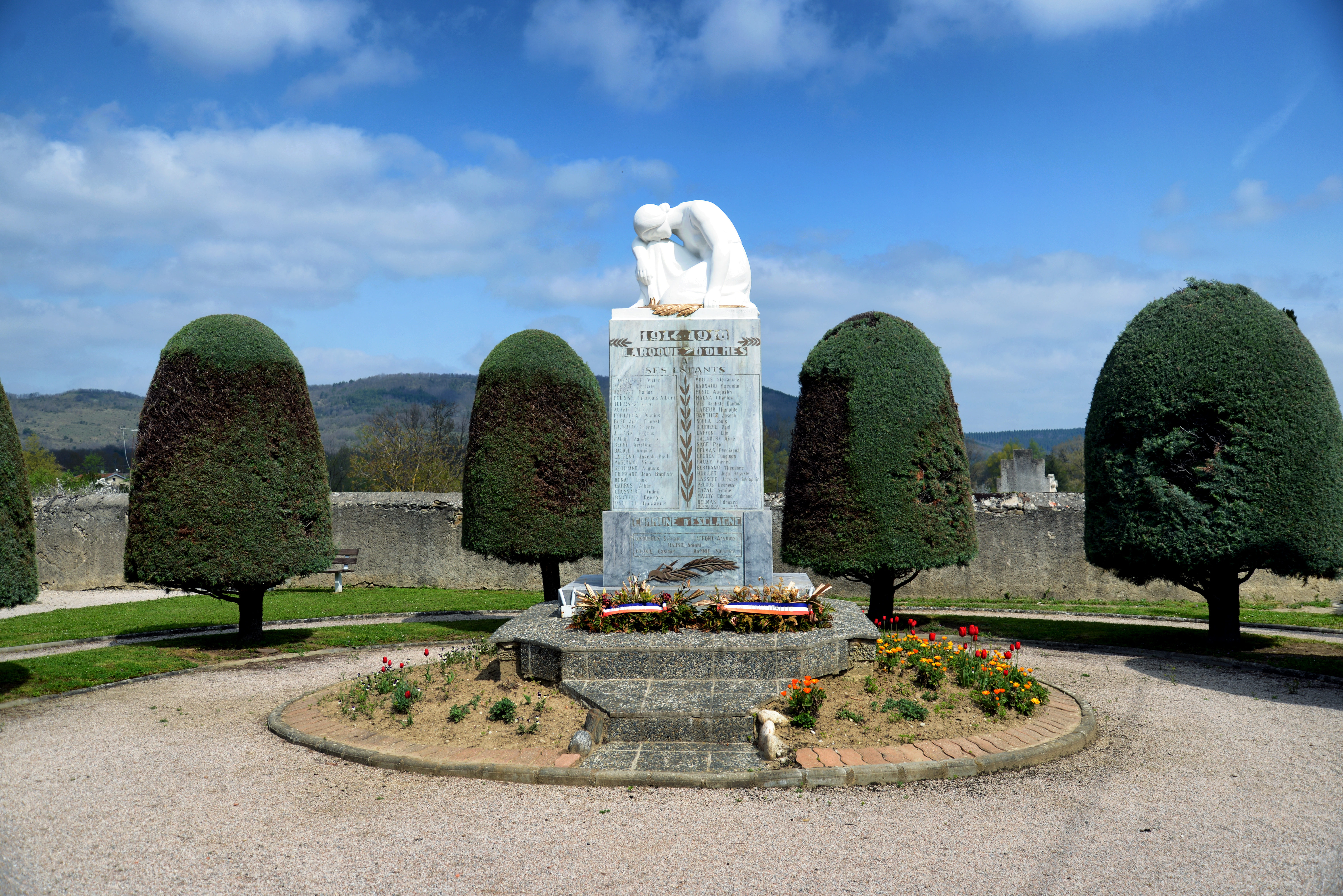 Laroque-d'Olmes, Arière (Midi-Pyrénées)